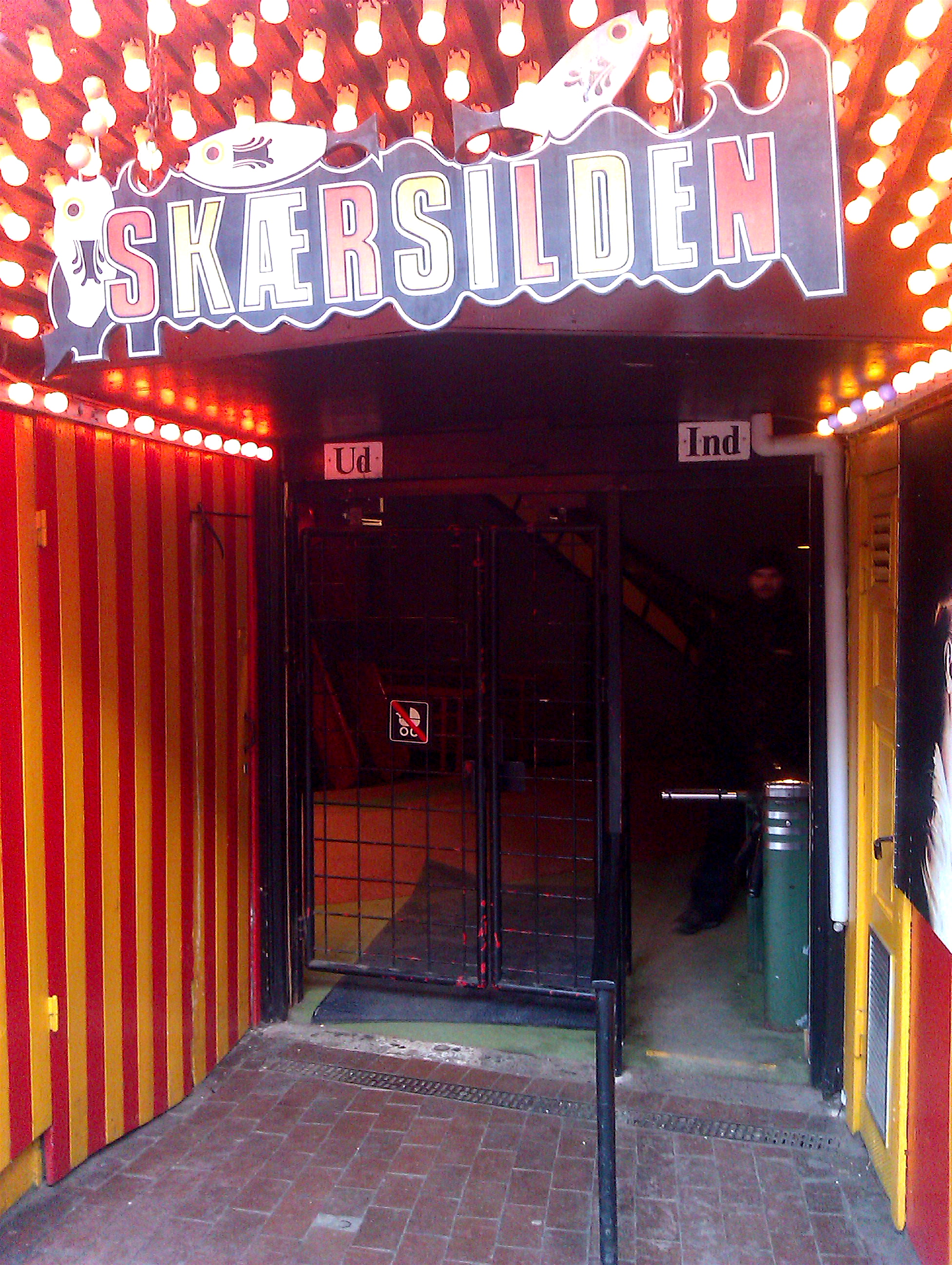 “Skærsilden” i Smøgen, Tivoli, København